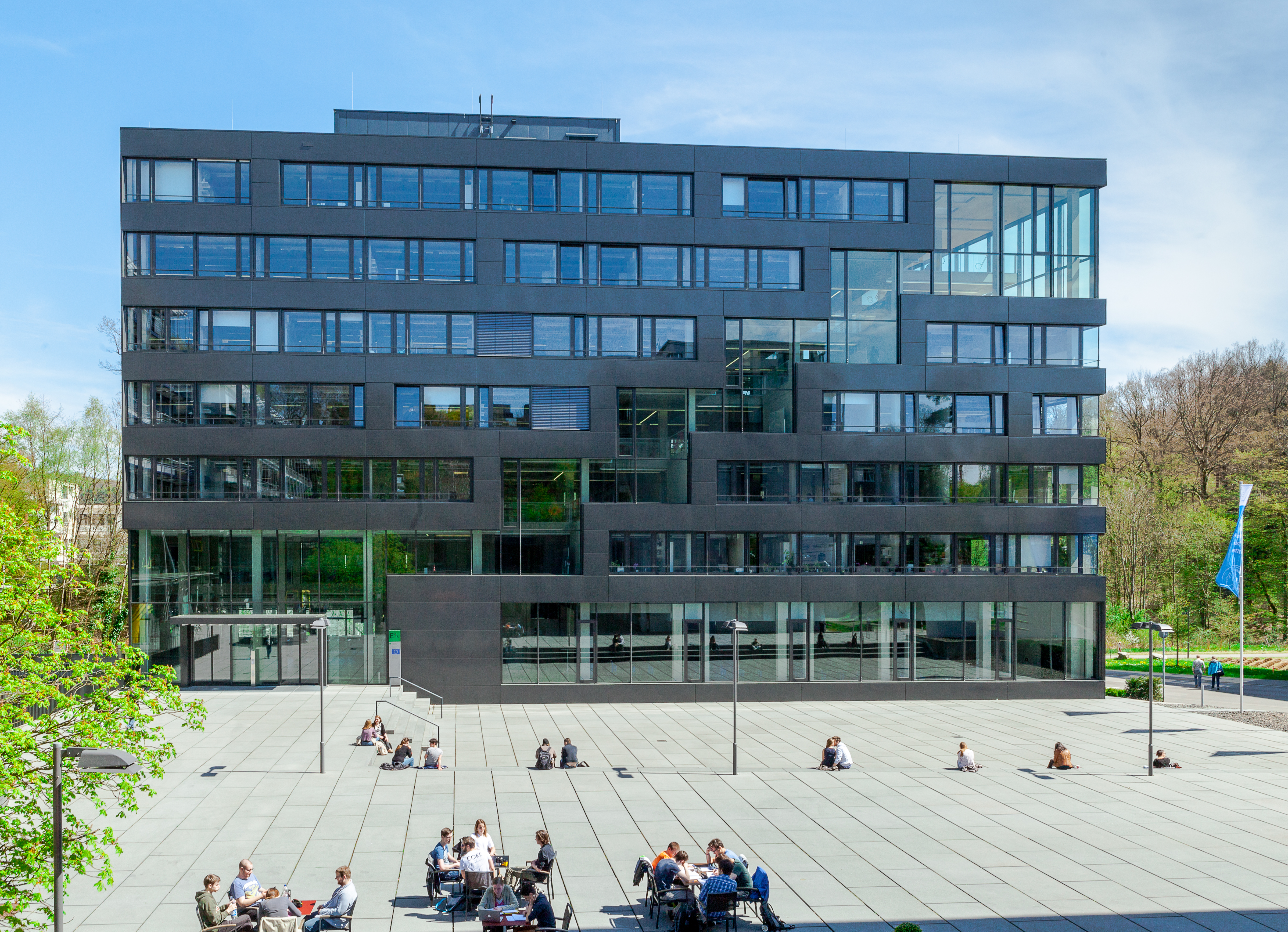 MPI für Softwaresysteme, Standort Saarbrücken